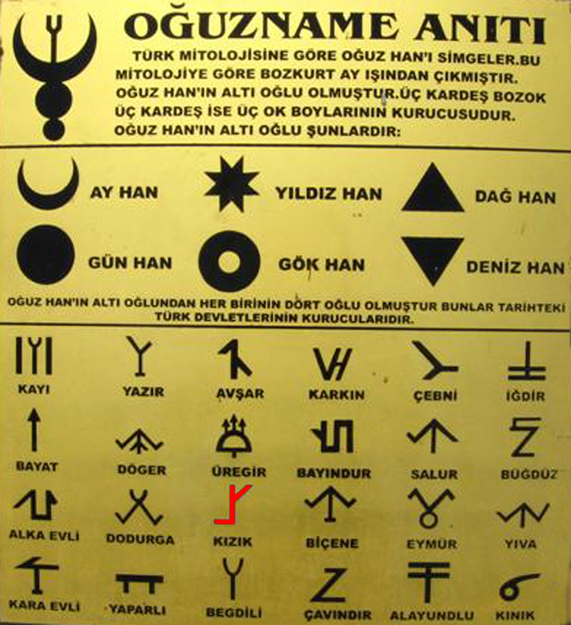 Kızık ve Diğer Boylar